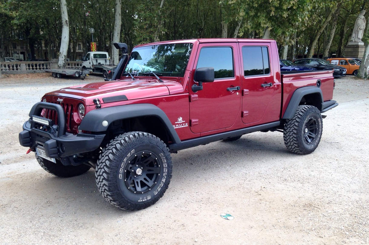 Jeep Pickup